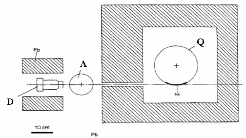 Mossbauerov uredjaj